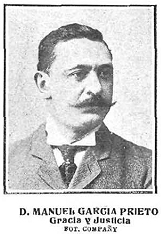 Retrato de Manuel García Prieto, ministro de Gracia y Justicia, fotografía de Manuel Compañy recogida en la revista española Nuevo Mundo.